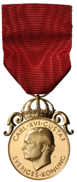 Åtsida